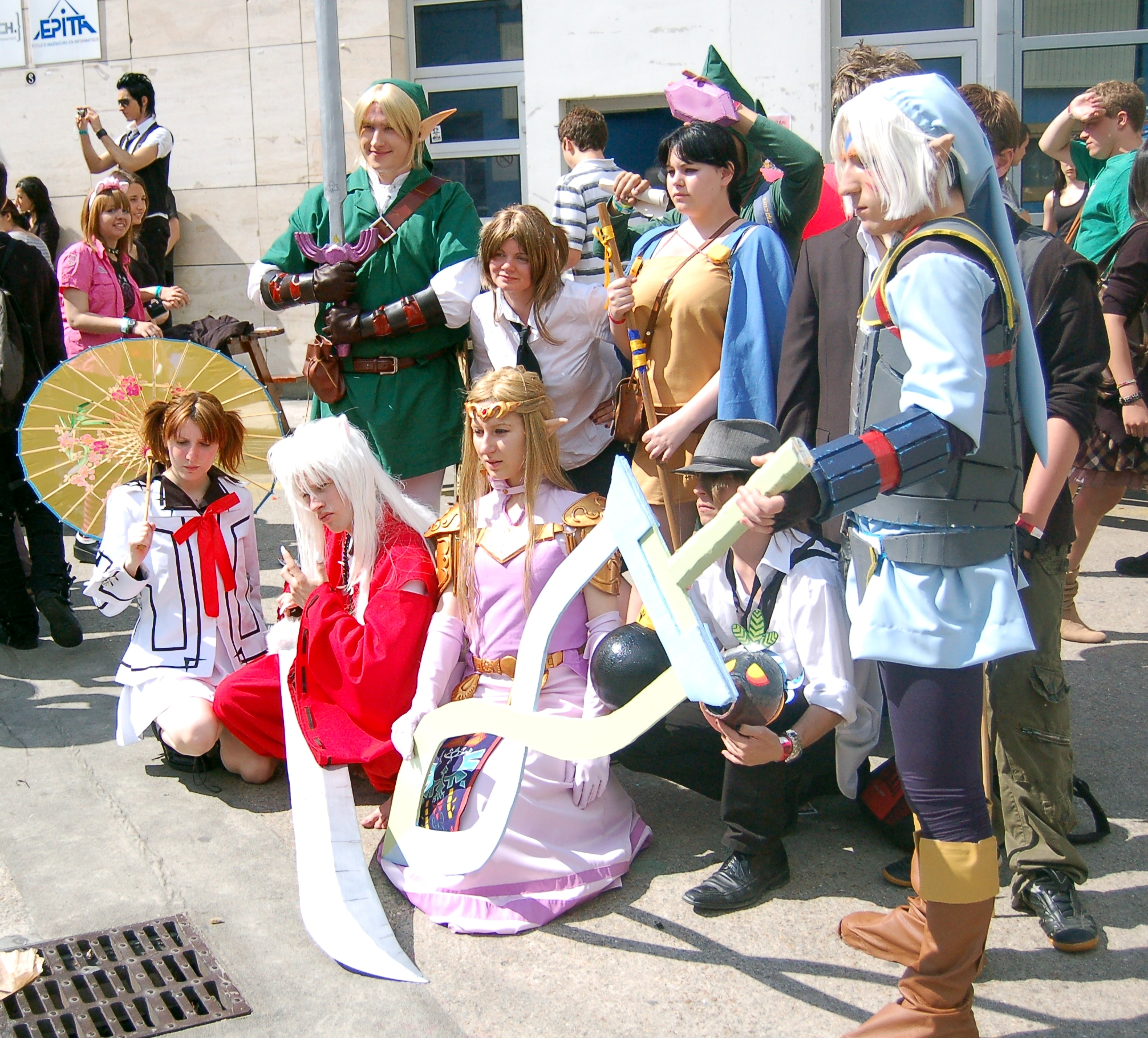 Convention de l'animation de l'EPITA 2009 - Cosplay